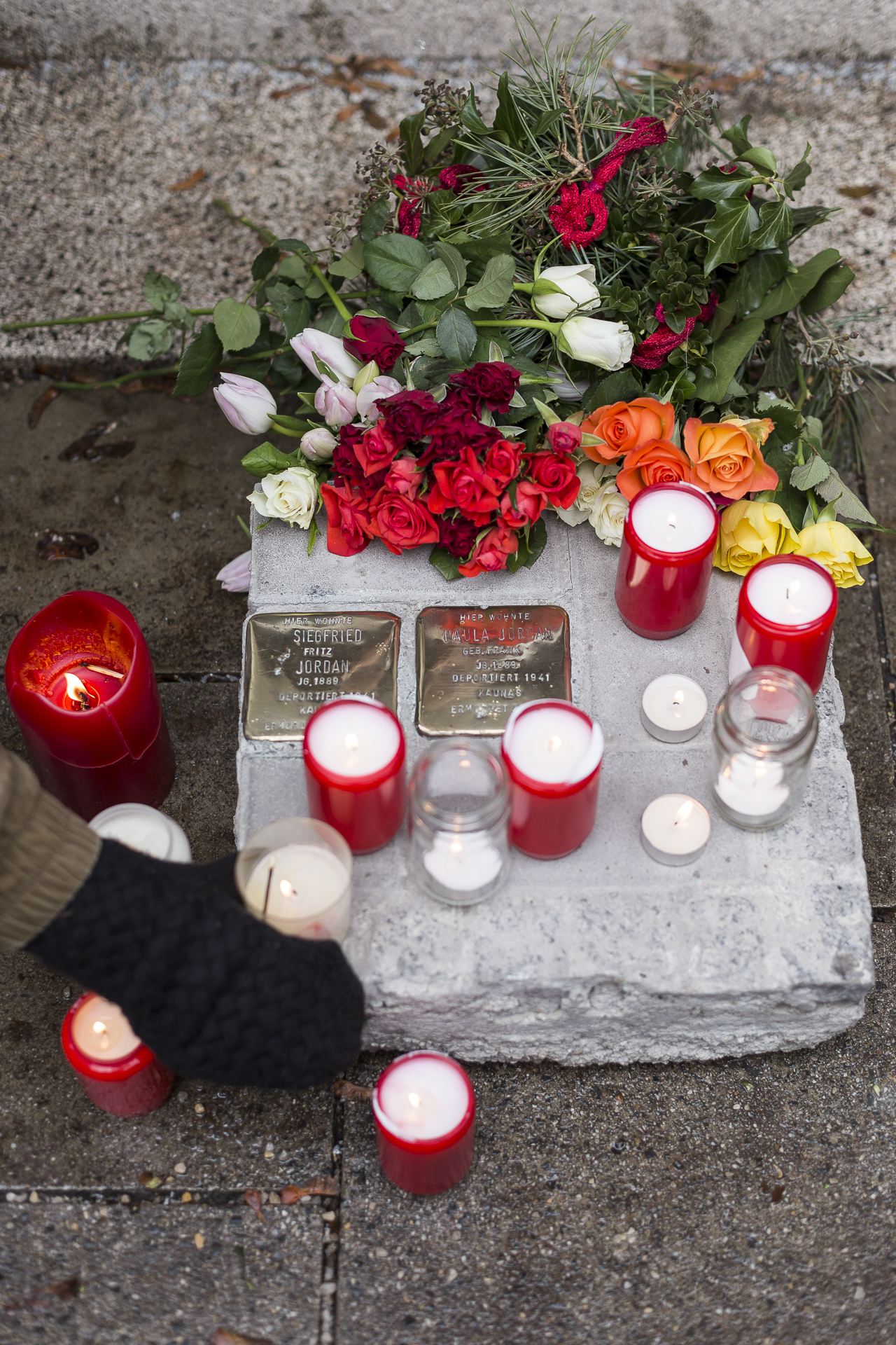 Stolpersteine for Paula and Siegfried Jordan